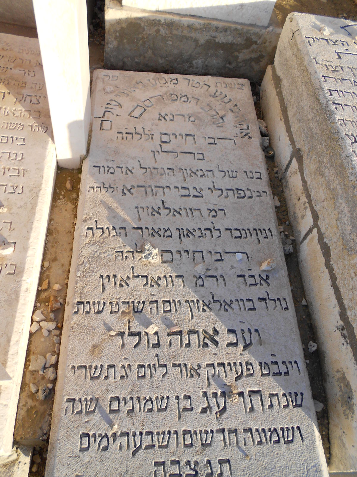 קברו של הרב חיים ברלין בהר הזיתים (העמוד שייך למתקן הנרות של הרבנים דיסקין)